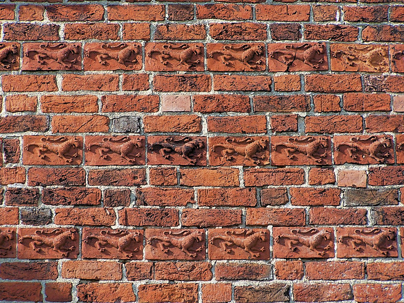 Kirche in Steffenshagen, Backstein-Friese am Chor